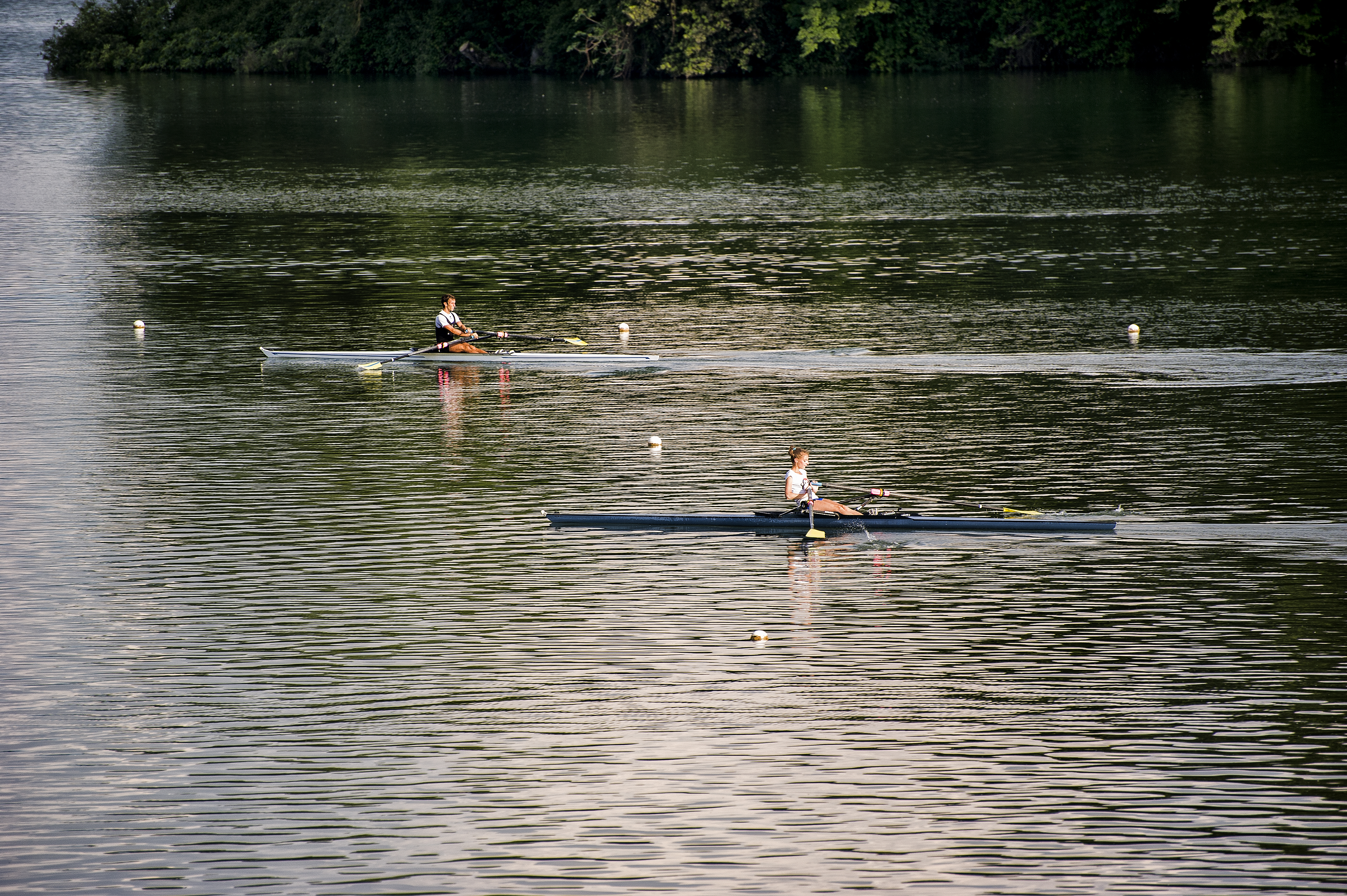 lago di Piediluco This is a photo of a monument which is part of cultural heritage of Italy.